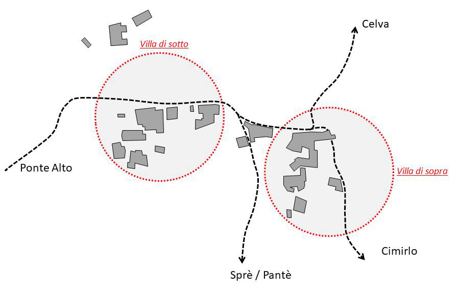 Nello schema sono indicati i percorsi viabilistici storici, gli insediamenti al 1850, l'articolazione dell'abitato nelle due ville (di sopra e di sotto)